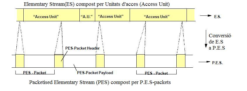 Conversio_de_es_a_pes paquets